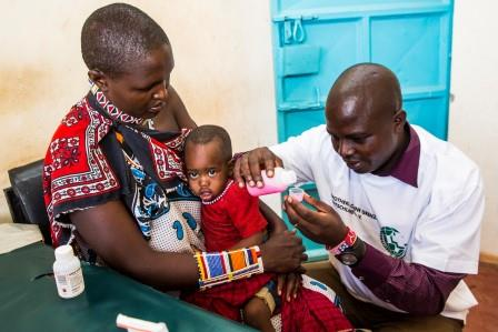 Apotheker ohne Grenzen, Health Center in Mile 46, Nalorwesha (Massai) mit ihrer Kranken Tochter Damaribu, Clinical Officer Antony Nailole untersucht und behandelt das kleine Maedchen